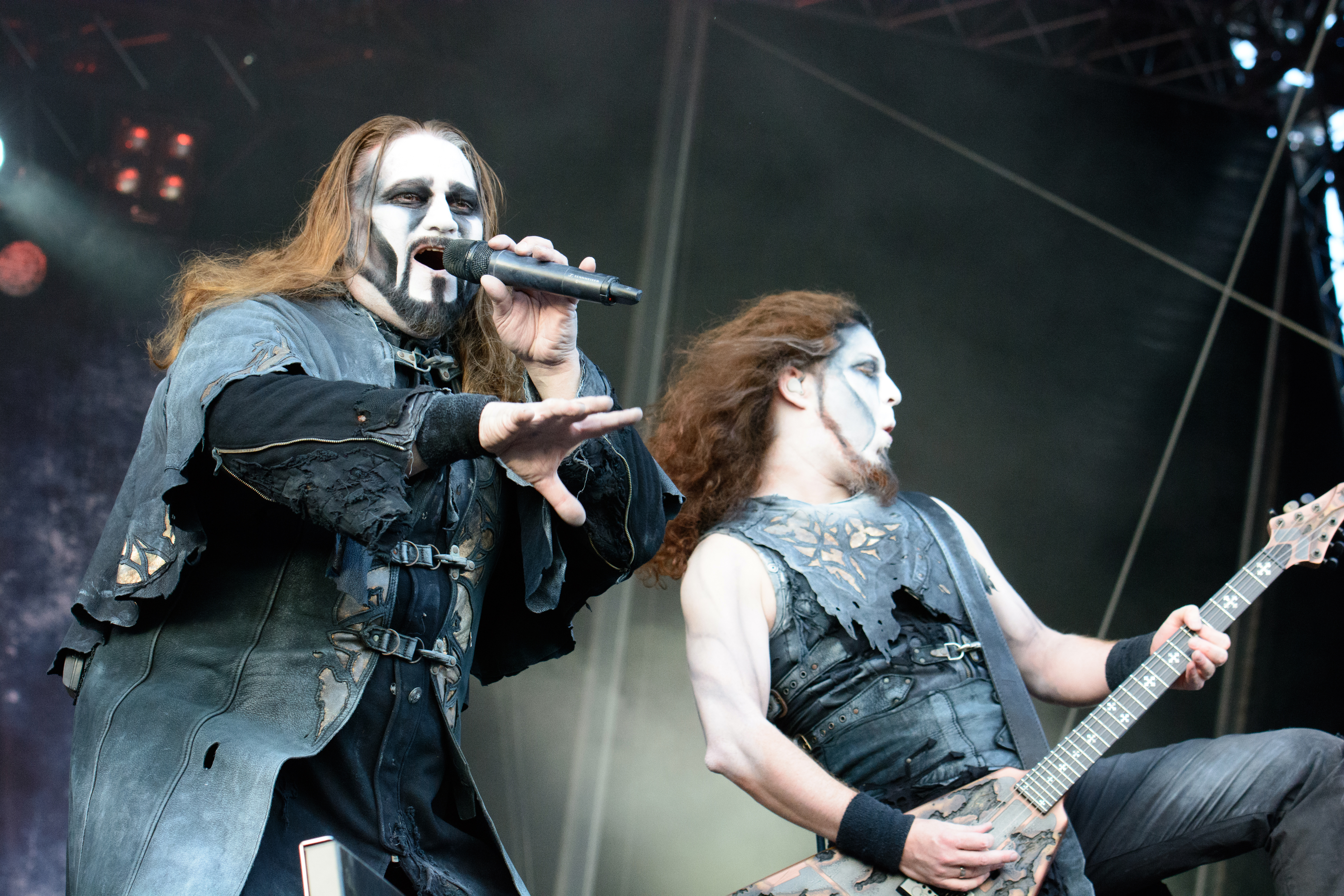 Powerwolf beim Elbriot 2016